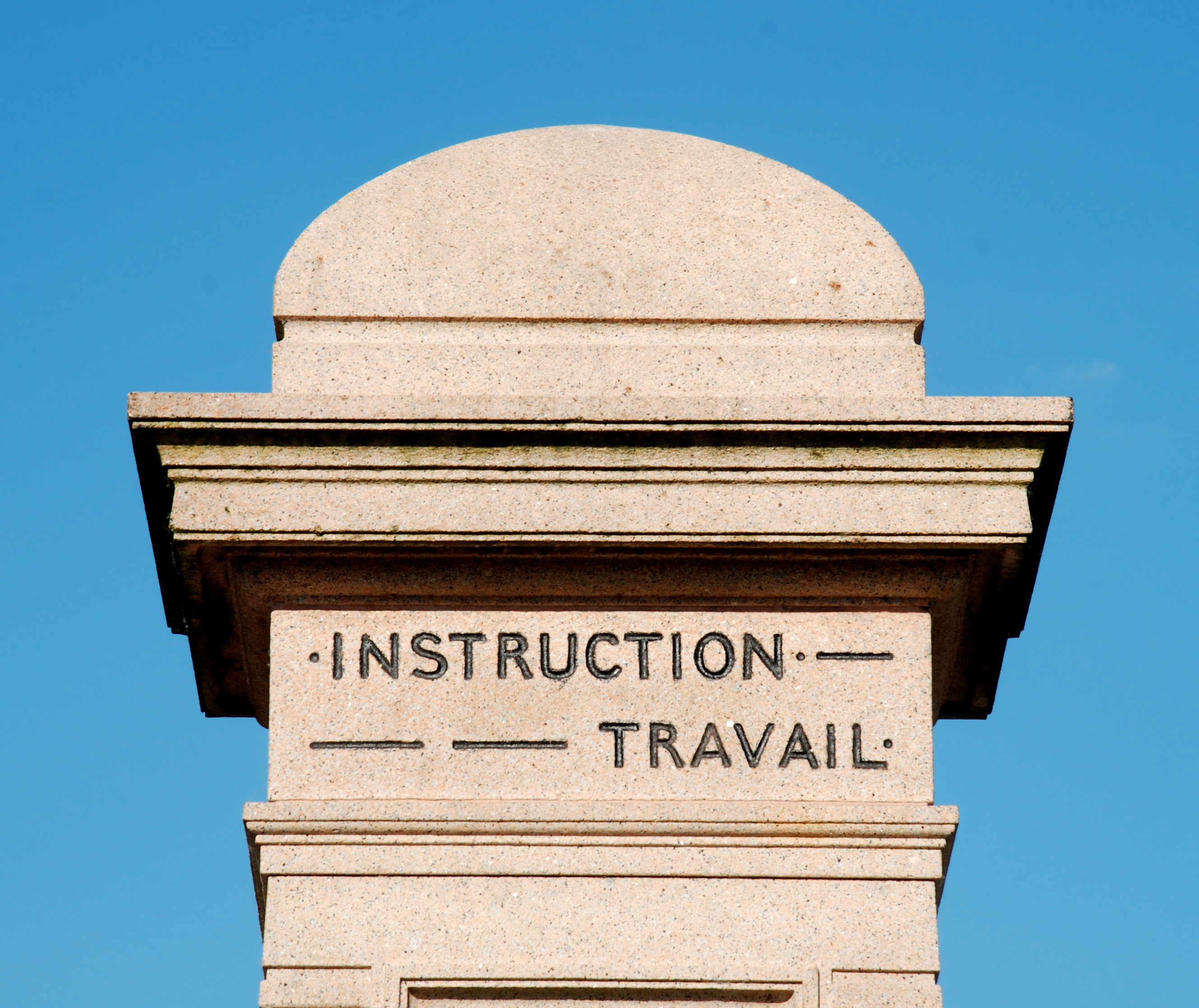 Belgique - Brabant wallon - Court-Saint-Étienne - Monument à Émile Henricot